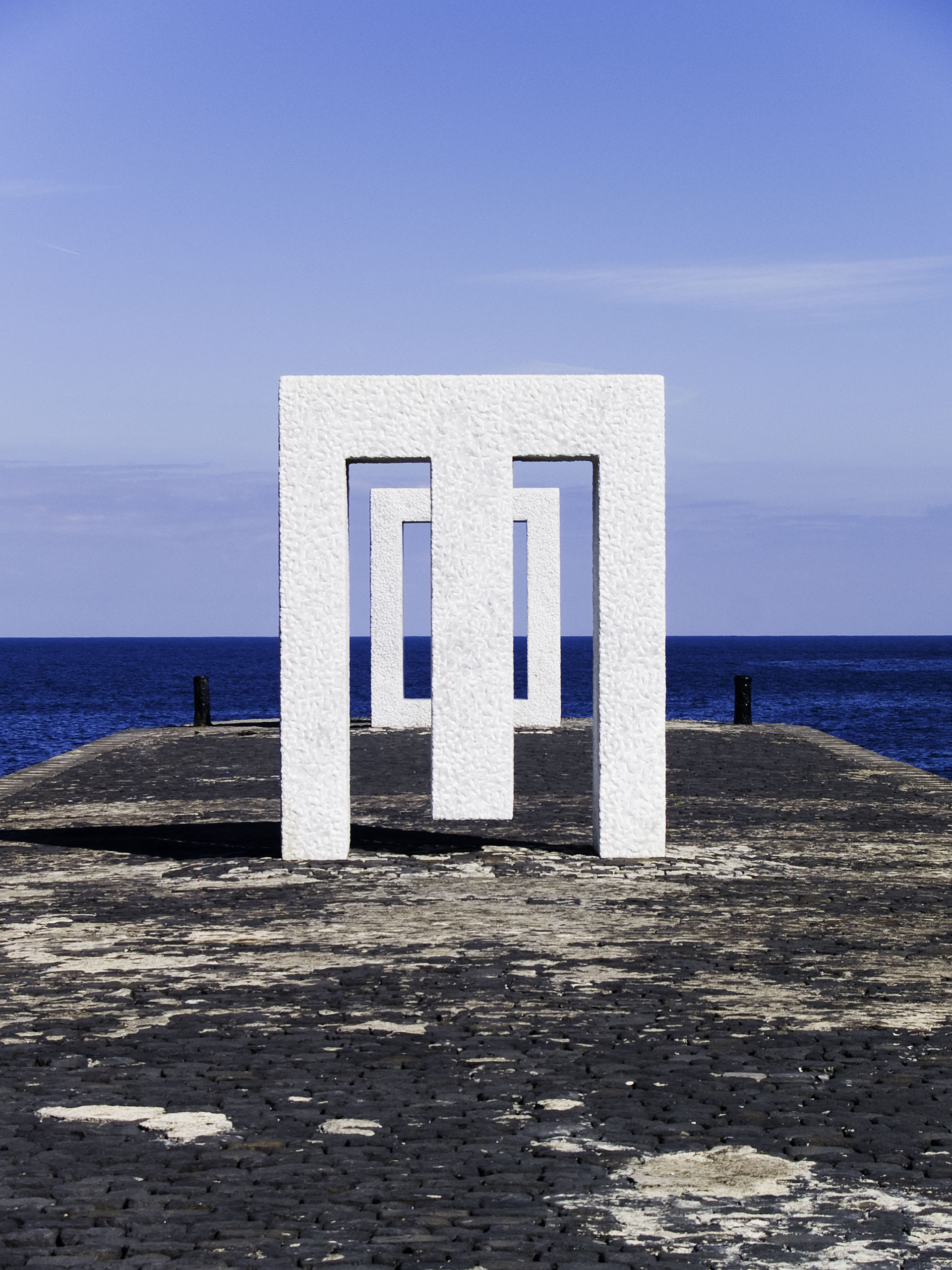 Escultura del japones Kan Yasuda en el puerto de Garachico.